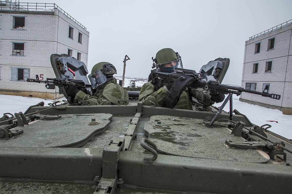 В Мулино сапёры-штурмовики 1-й гвардейской инженерно-сапёрной бригады отработали действия по проделыванию проходов в минных полях.